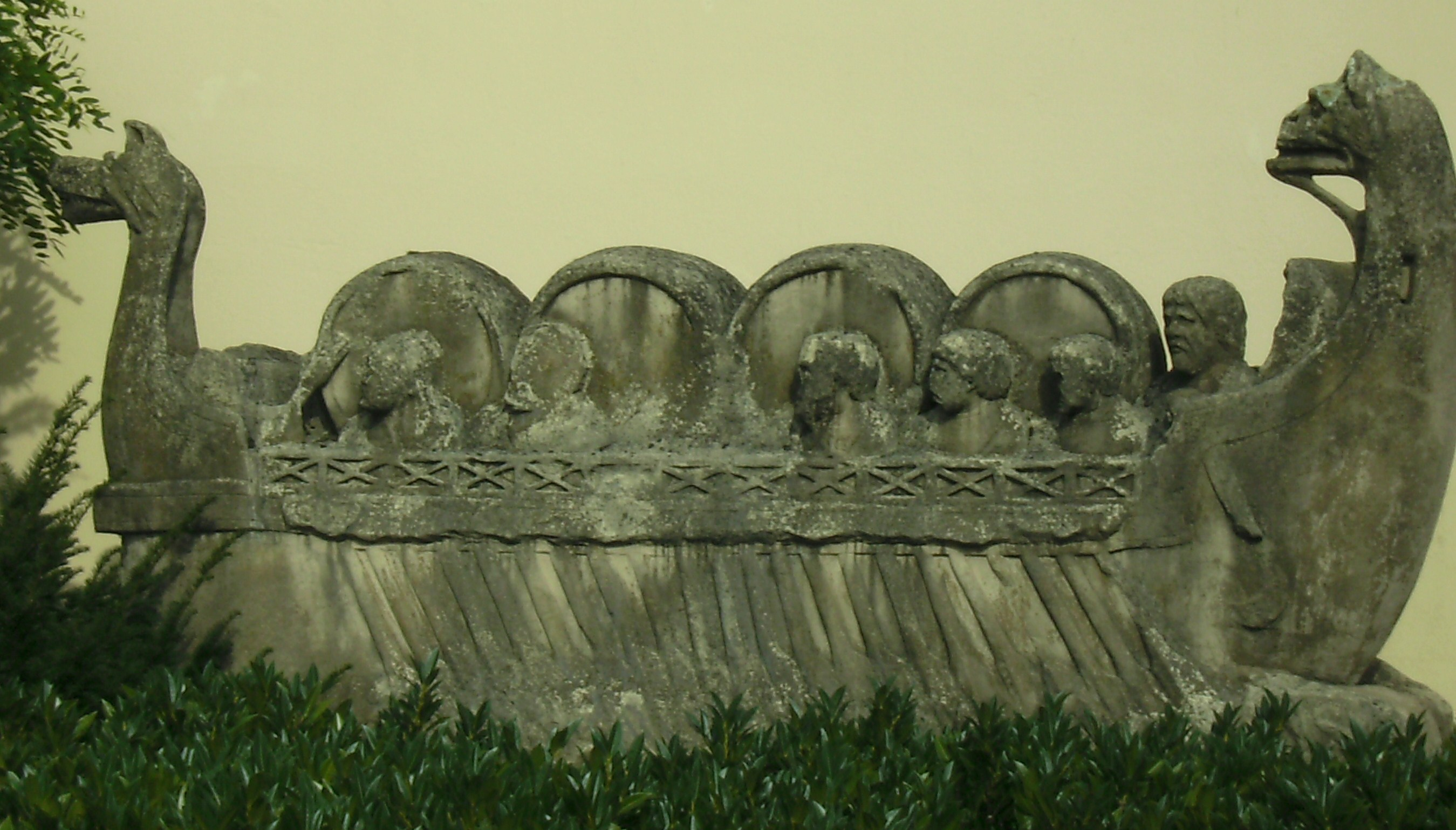 Originalgetreues Replikat des "Neumagener Weinschiffs" im Eingangsbereich der "Vereinigten Hospitien" in Trier